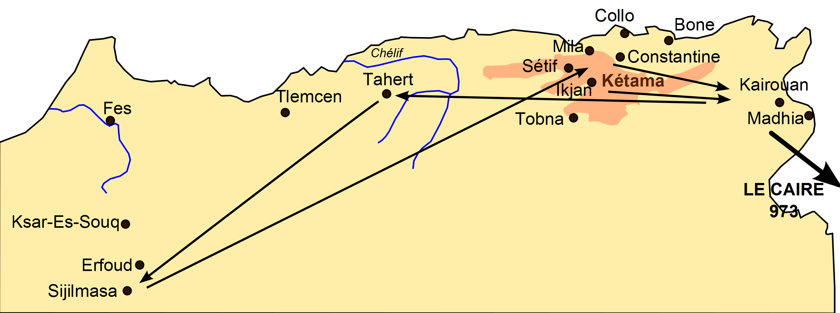 Fatimides au Maghreb de 909 à 973 (carte inspirée du livre de d'Edmoud Jouhaud - Histoire de l'Afrique du Nord)